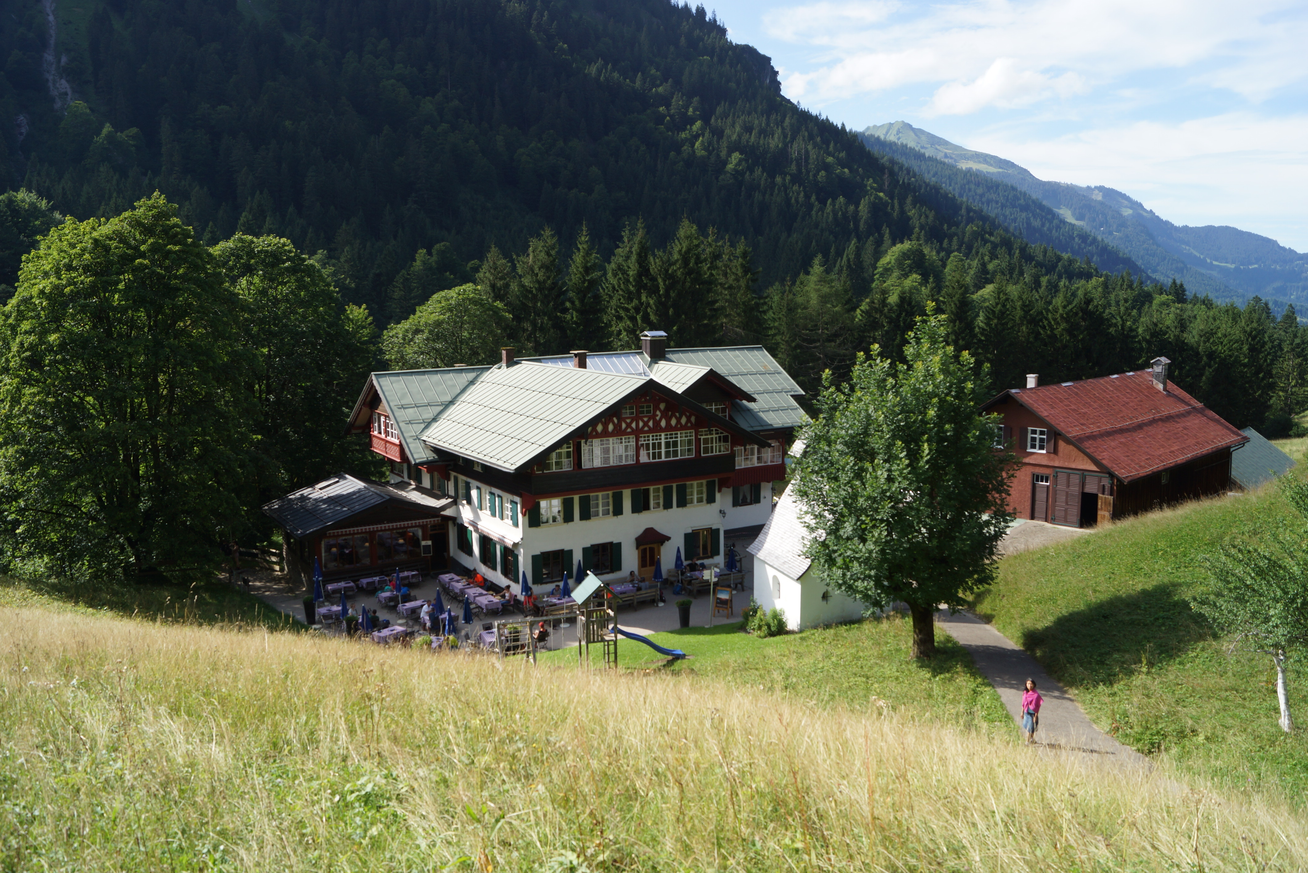 Germany Bavaria - Allgäuer Alpen 1.113 m ü. NHN